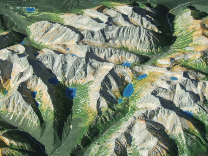 Mapa Plastyczna Tatr w skali 1:50 000 wyrzeźbiona w gipsie. Autorem rzeźby jest Jerzy Zasadni